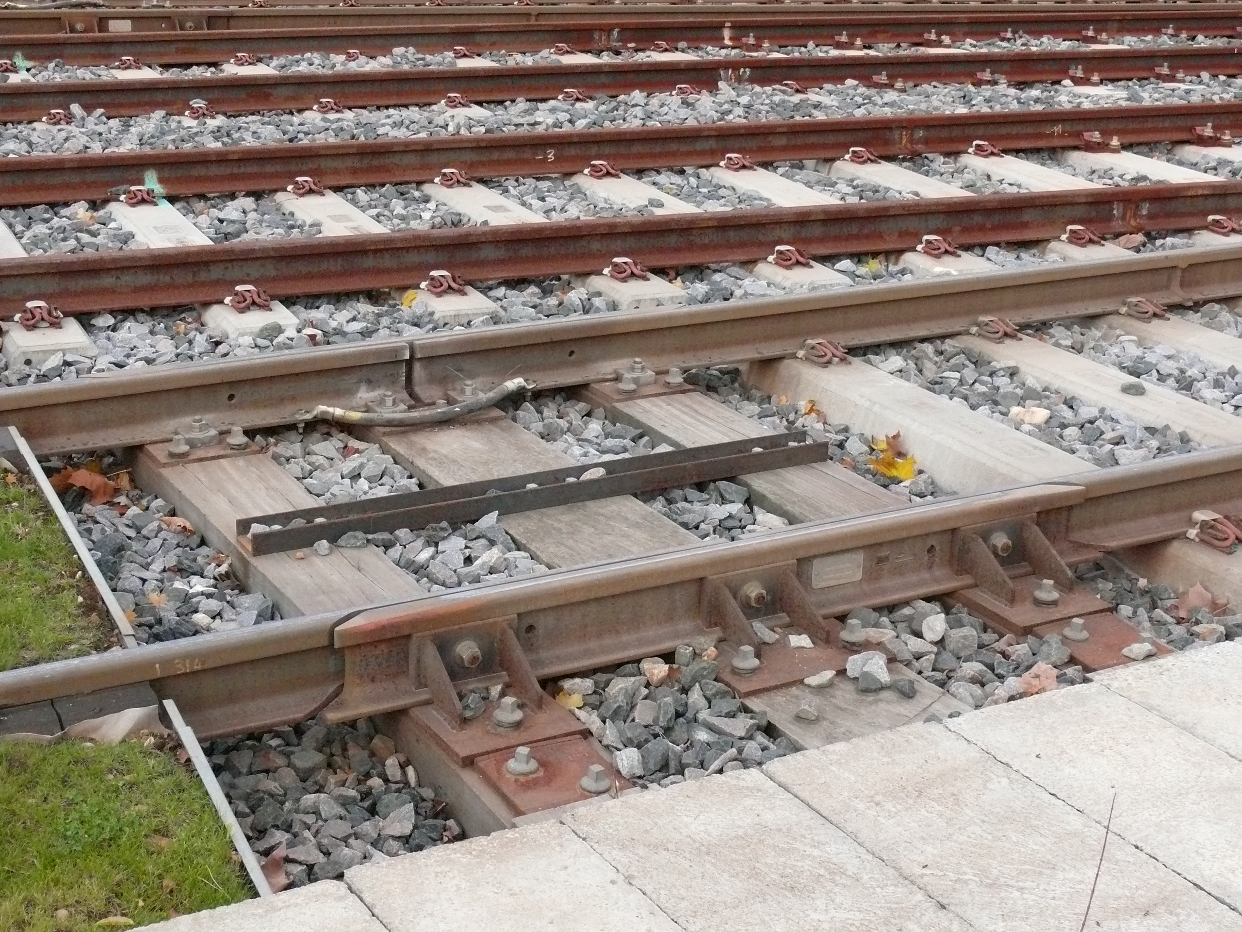 Détail de la voie de la Ligne 3 du tramway de Lyon, généralement posée sur ballast et traverses béton, avec attaches élastiques.On distingue à gauche la fin d'une section engazonnée, avec une mousse anti-vibratile posée le long des rails afin d'éviter de transmettre des vibrations au voisinage. .Au centre de la photo, appareil de dilatation des longs rails soudés, posés sur traverses en bois.